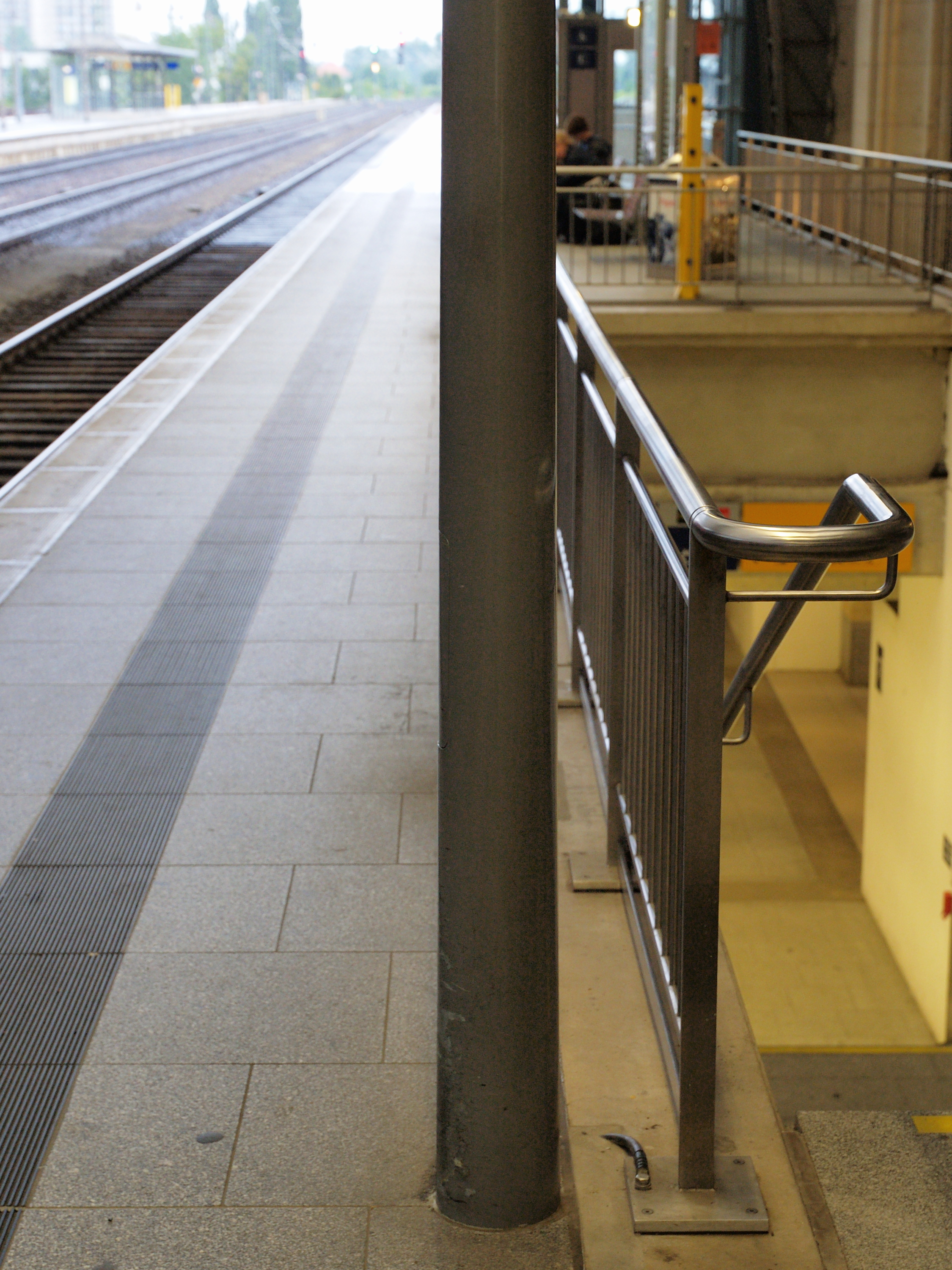 Erdung eines Geländers